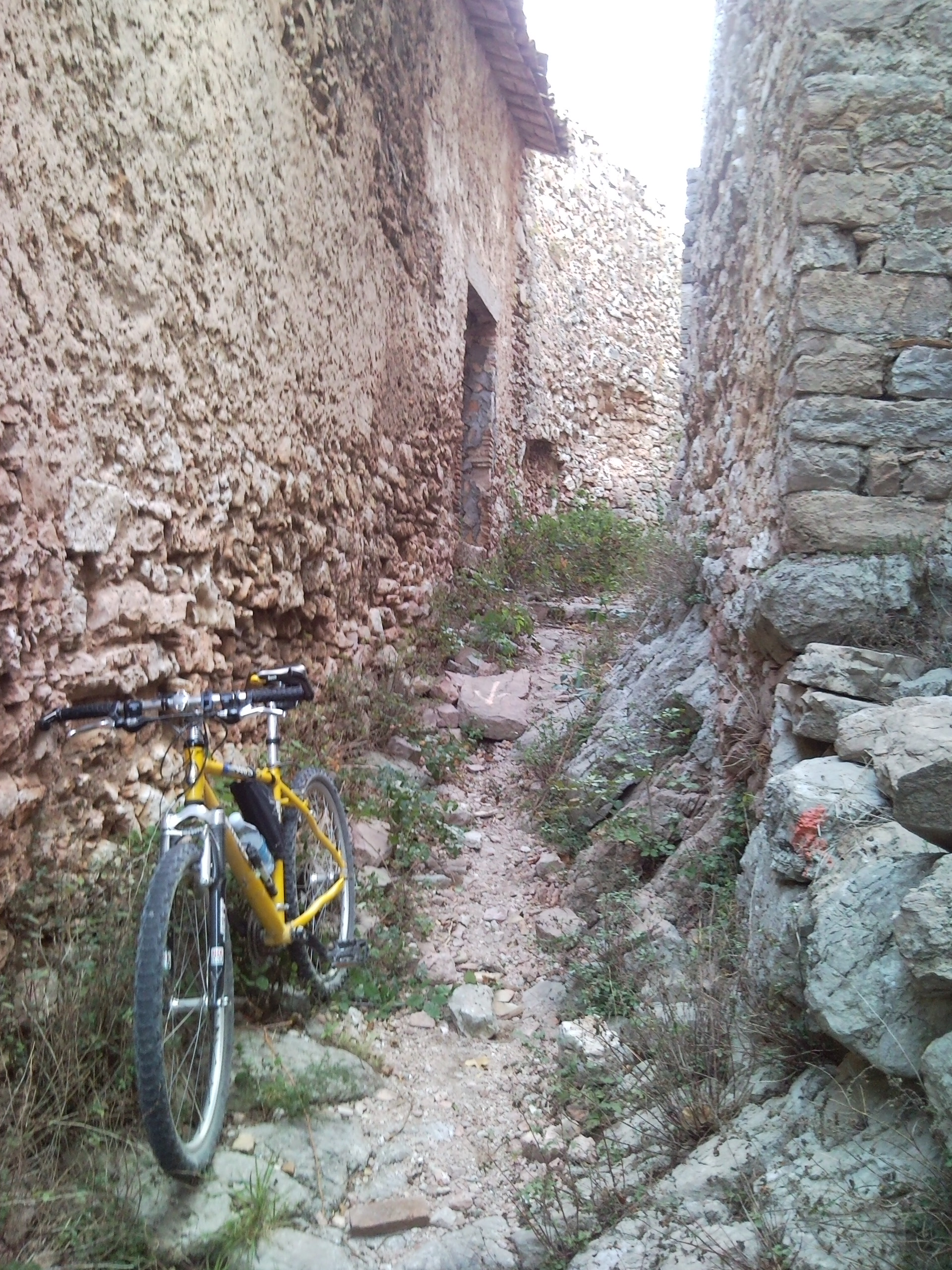 Umbriano